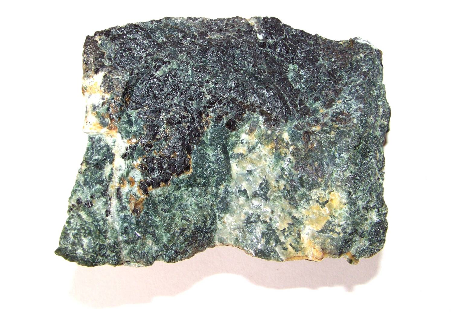 Kumulat chromitowy w serpentynicie. Przełęcz Tąpadła, Dolny Śląsk.